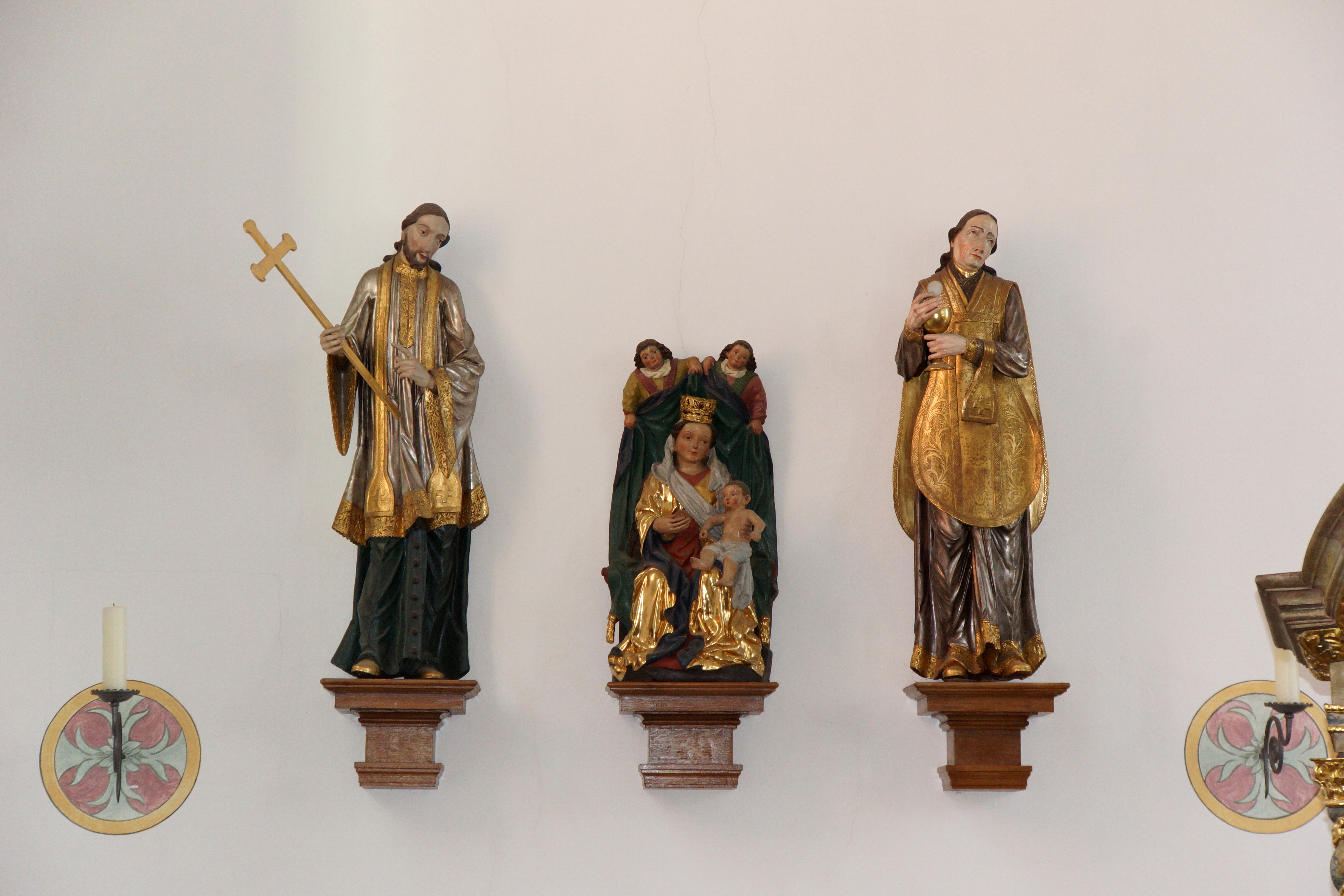 Die Pfarrkirche St. Barbara in Abendsberg